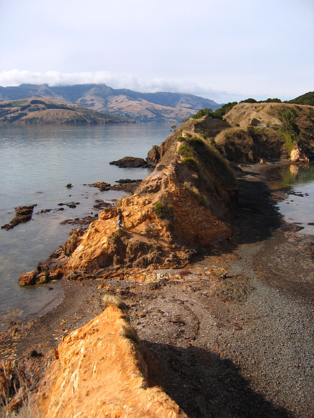 Onawe Peninsula, Banks Peninsula